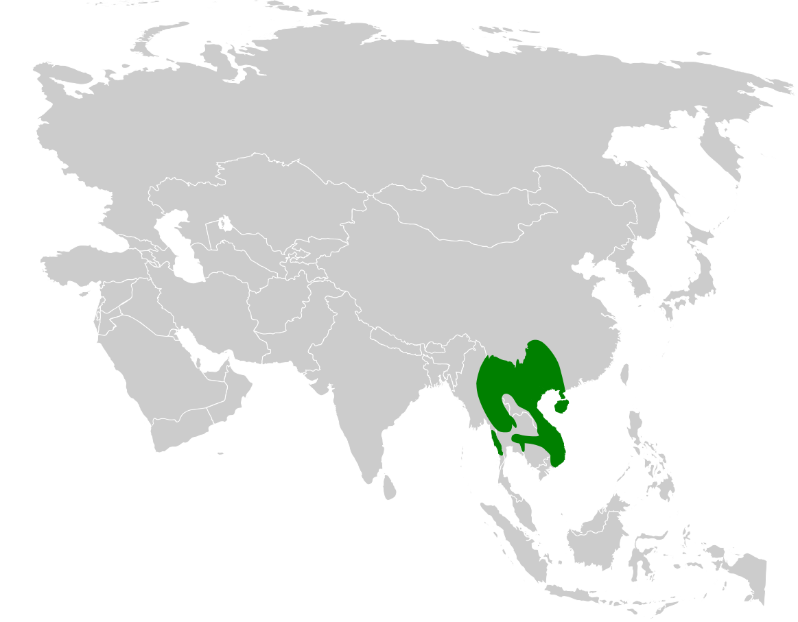 Alophoixus pallidus distribution map, based on